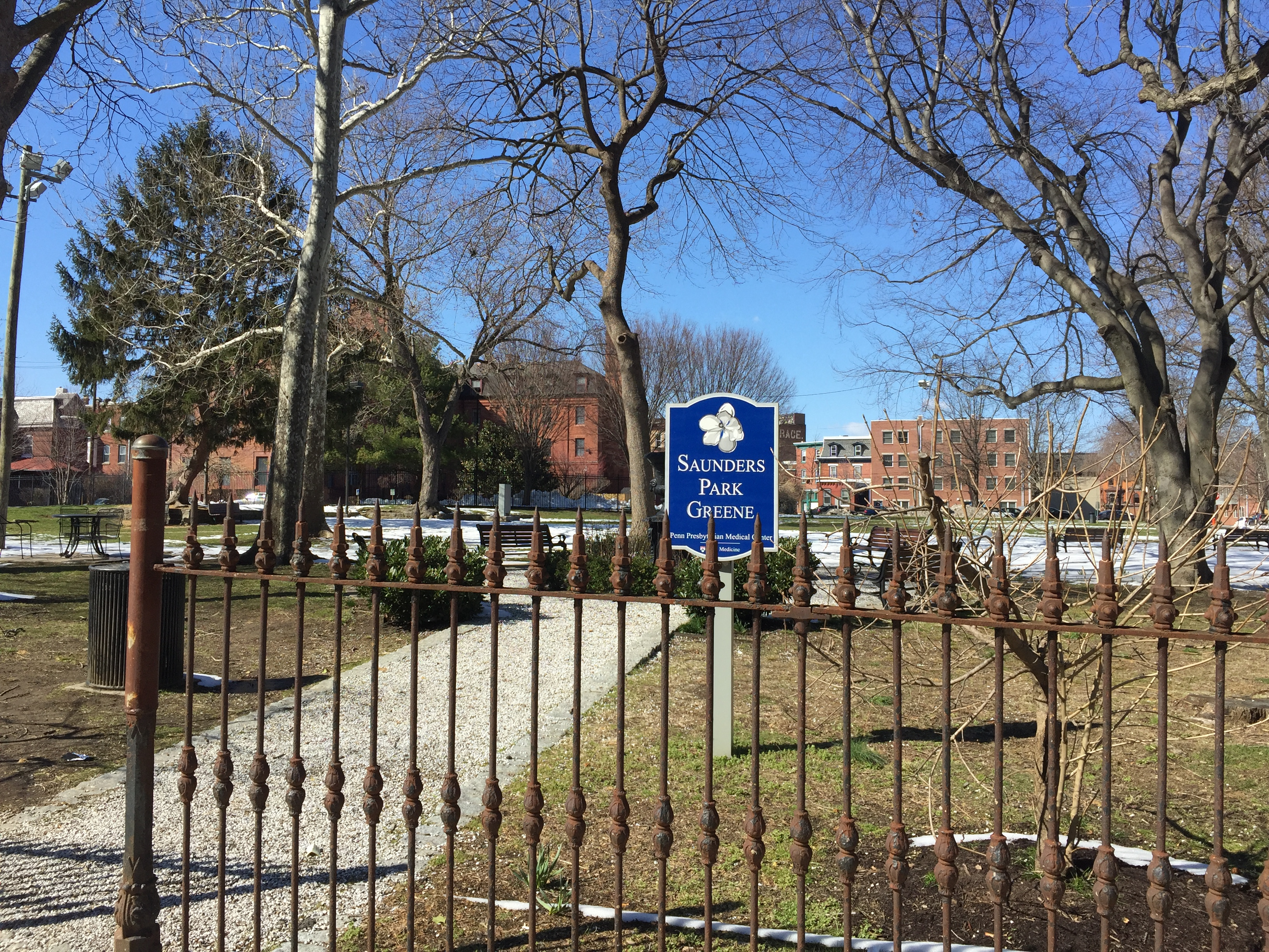 Saunders Park